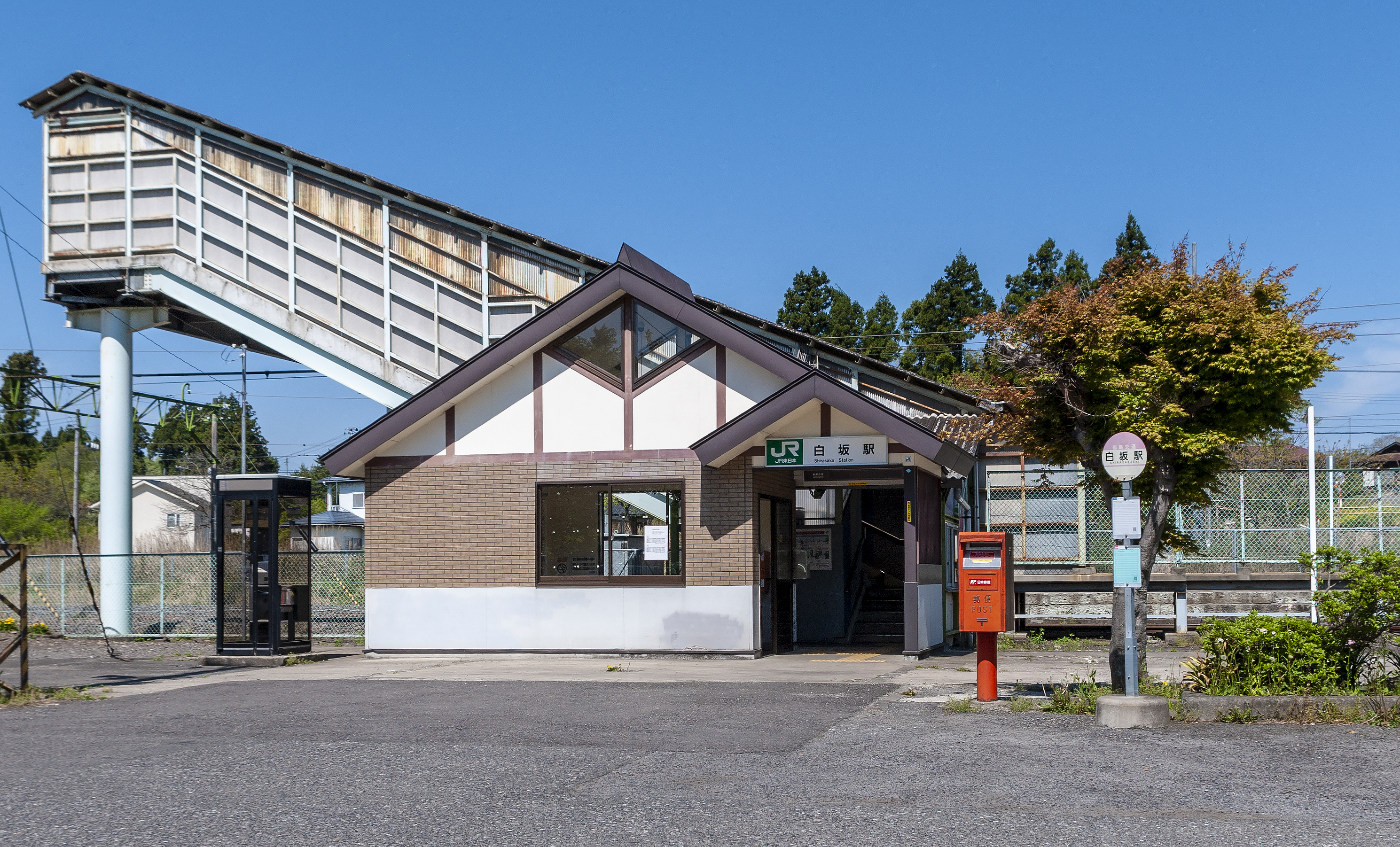 東日本旅客鉄道株式会社東北本線白坂駅駅舎